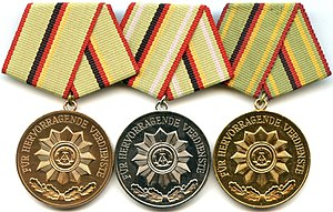 Verdienstmedaille der Organe des Ministeriums des Innern en bronze, argent et or